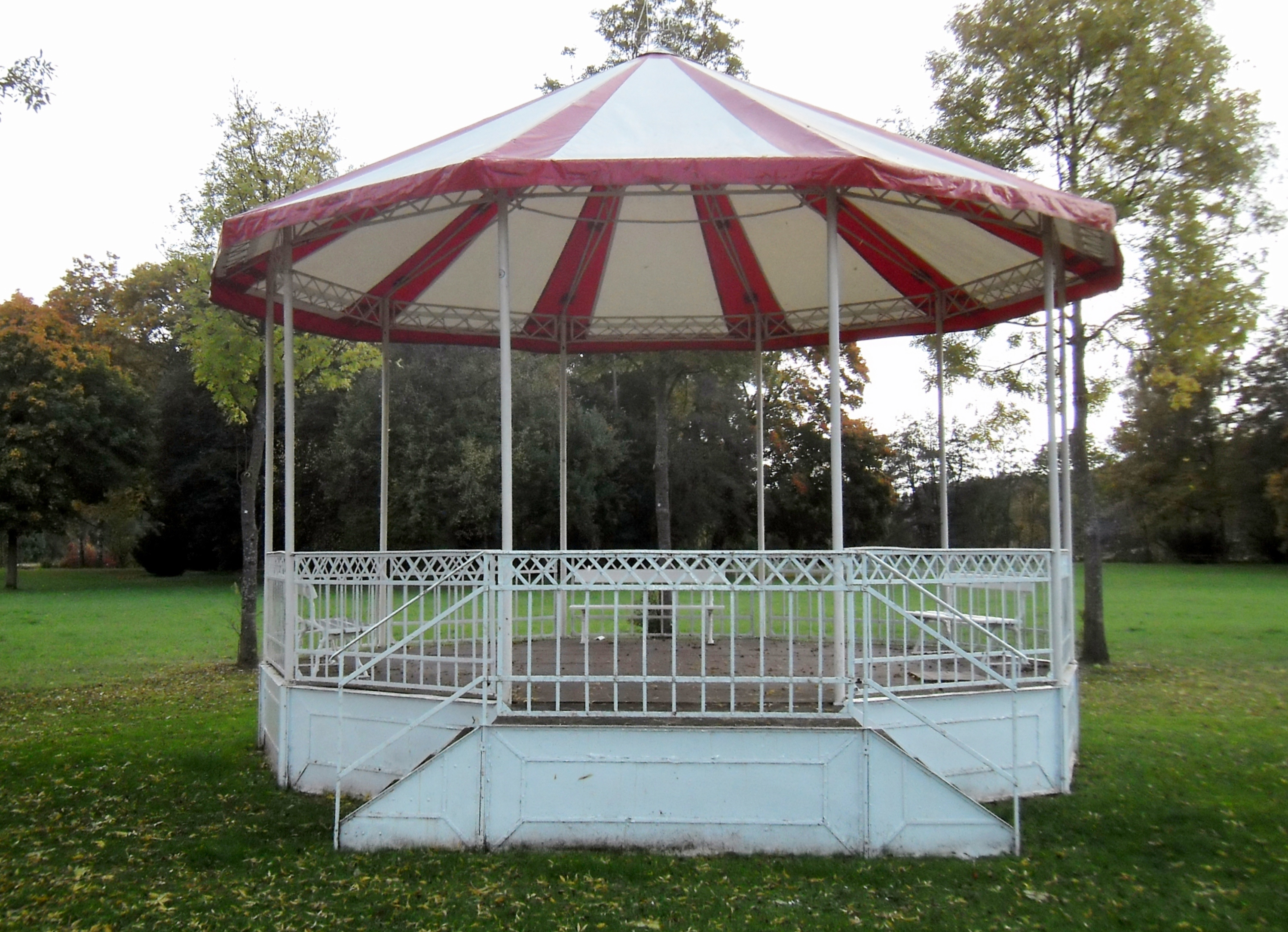 alter Musikpavillon in Bad Bocklet